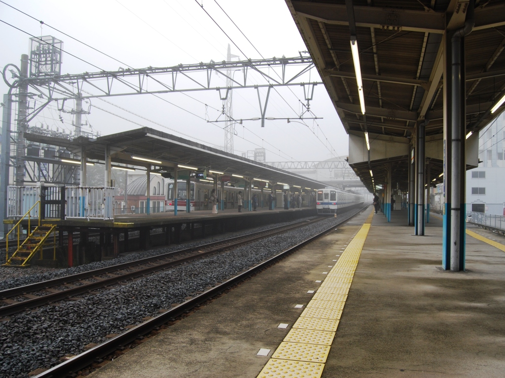 東武鉄道伊勢崎線せんげん台駅ホーム全景（2008-10-7撮影）